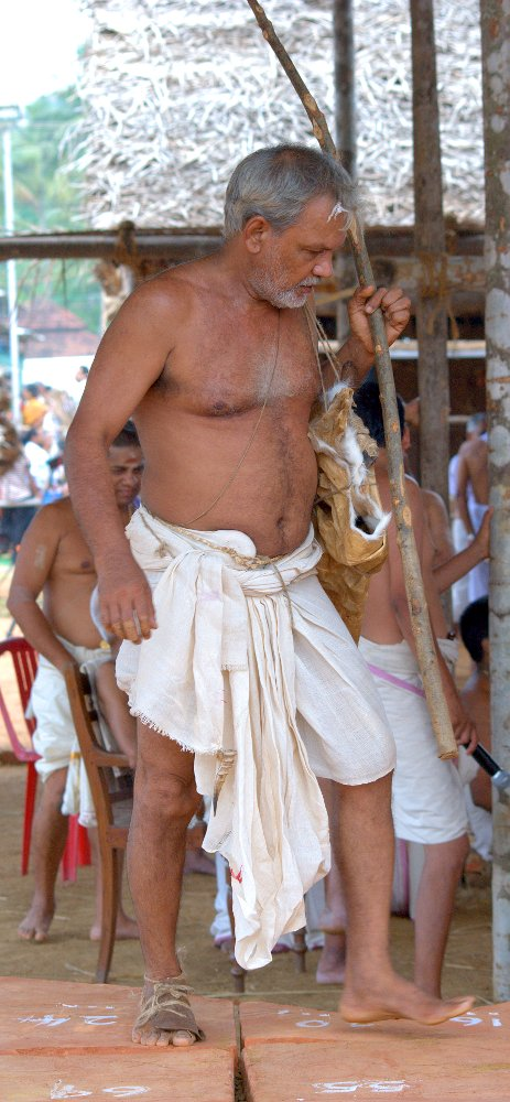 പുത്തില്ലത്ത് രാമാനുജൻ സോമയാജിപ്പാട് - അതിരാത്രത്തിന്റെ യജമാനൻ